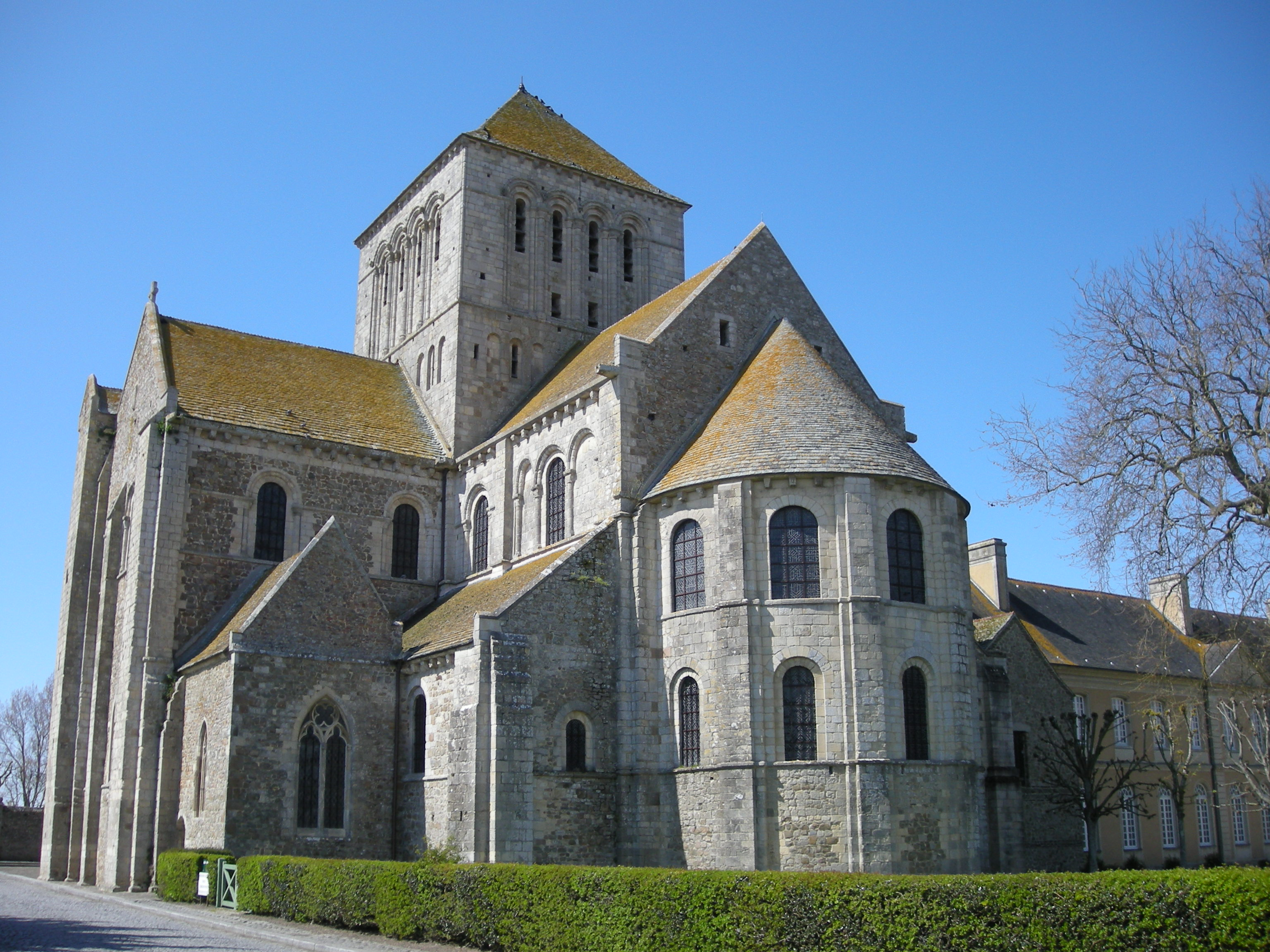 Abbaye de Lessay (département de la Manche)